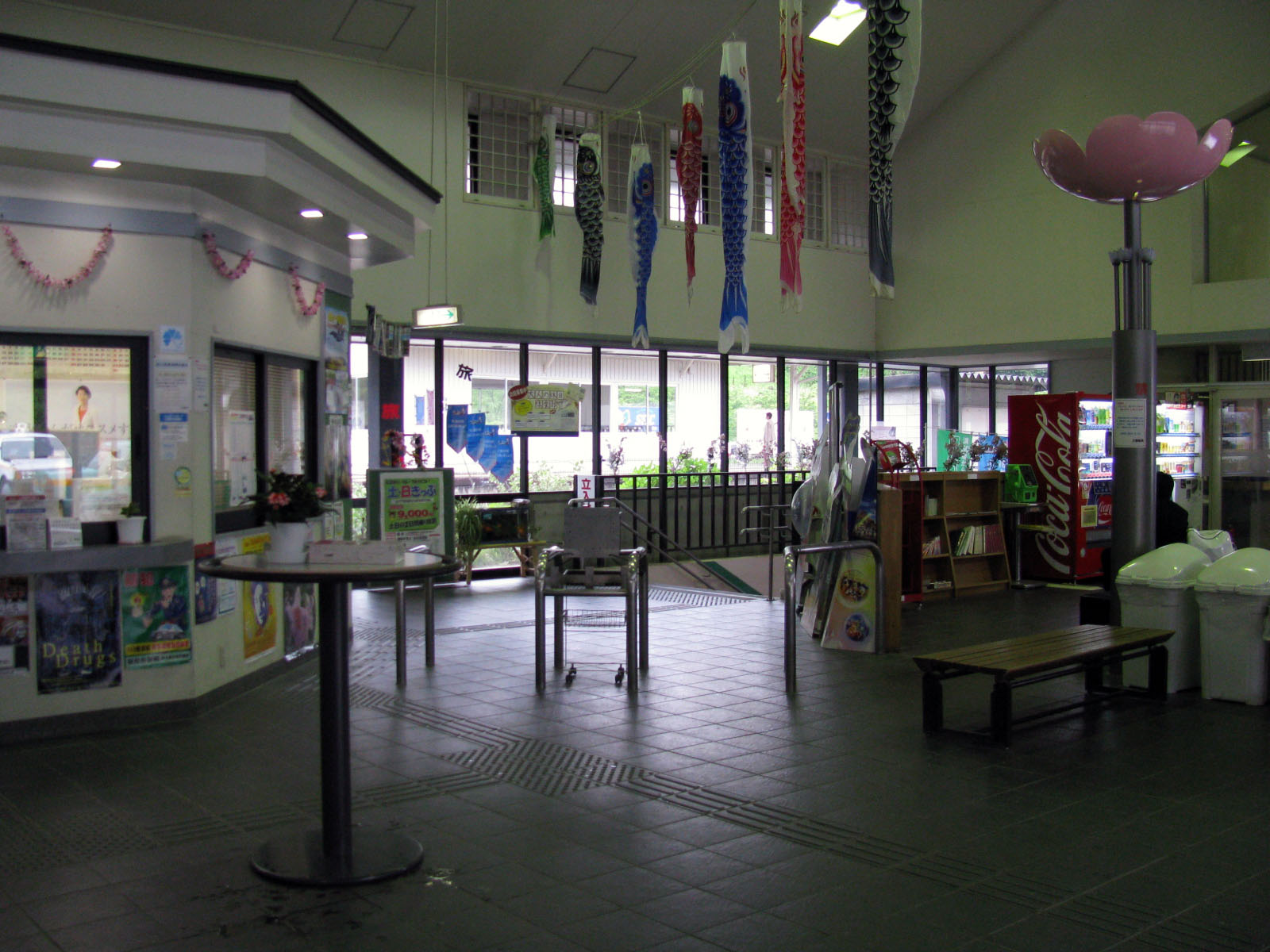 磐越東線三春駅